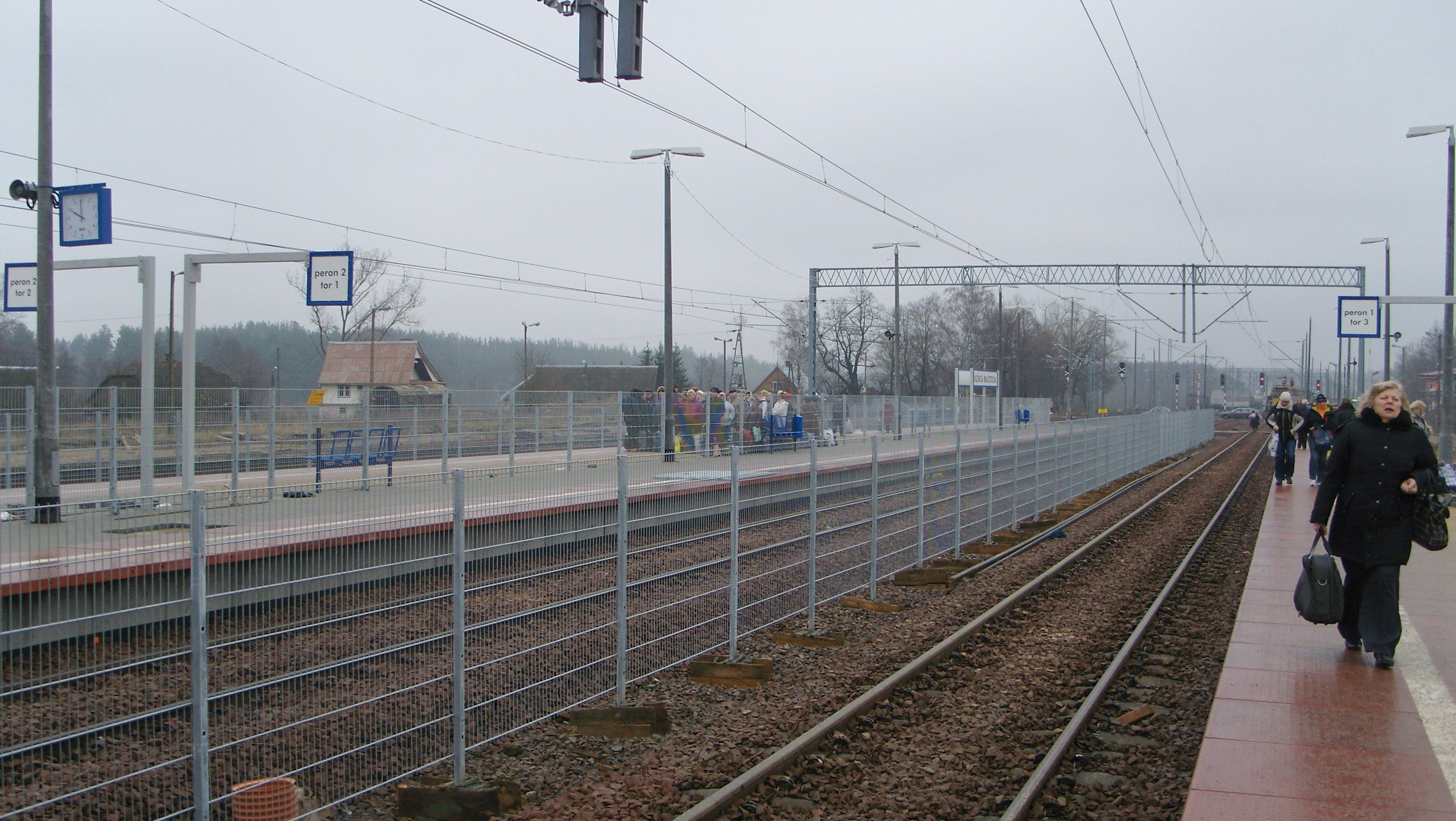 Stacja kolejowa w Kuźnicy Białostockiej.